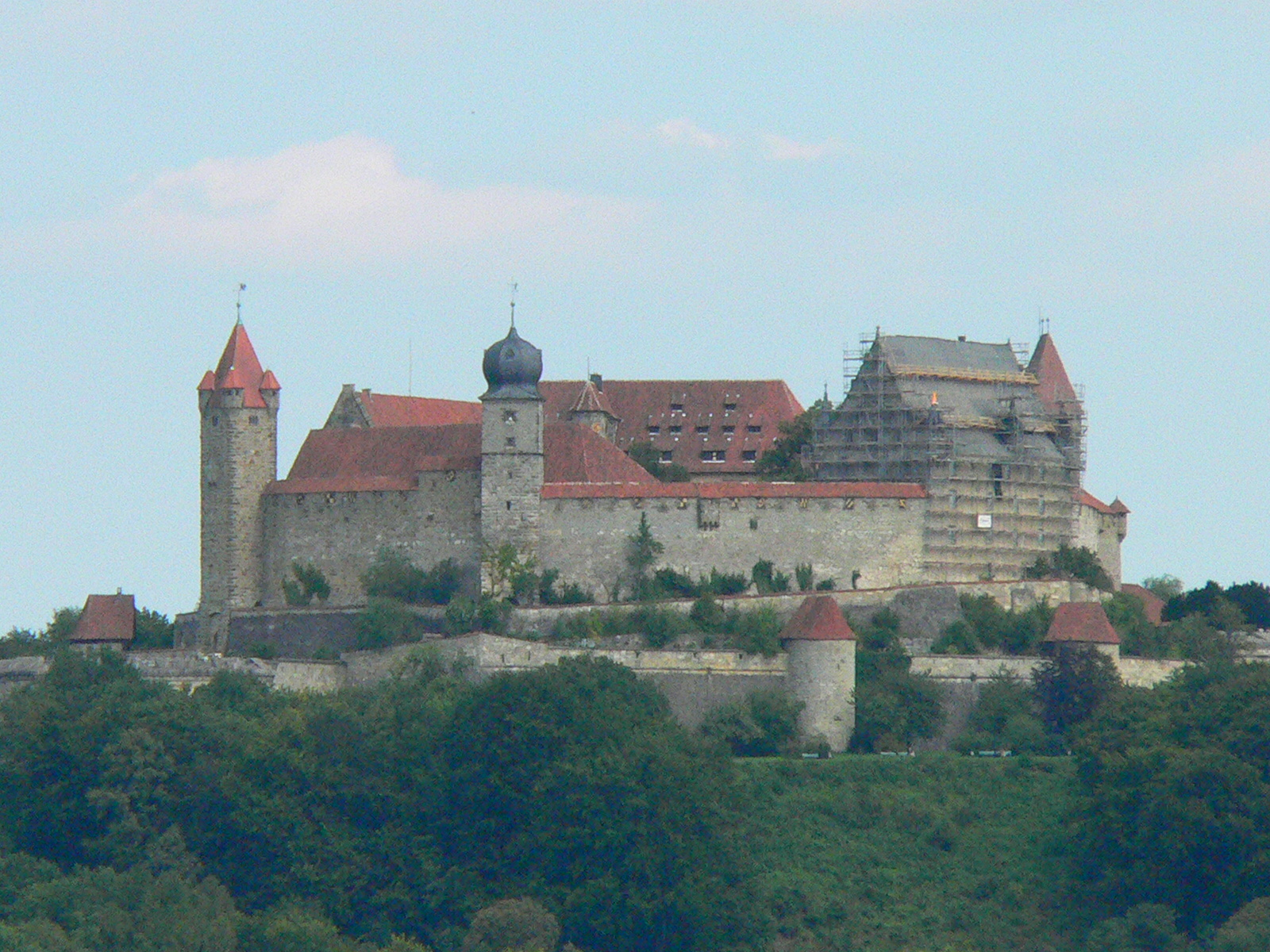 Veste Coburg, Ansicht vom Bismarkturm aus (Westansicht)